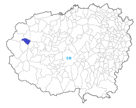 posizione del comune in provincia di Cuneo